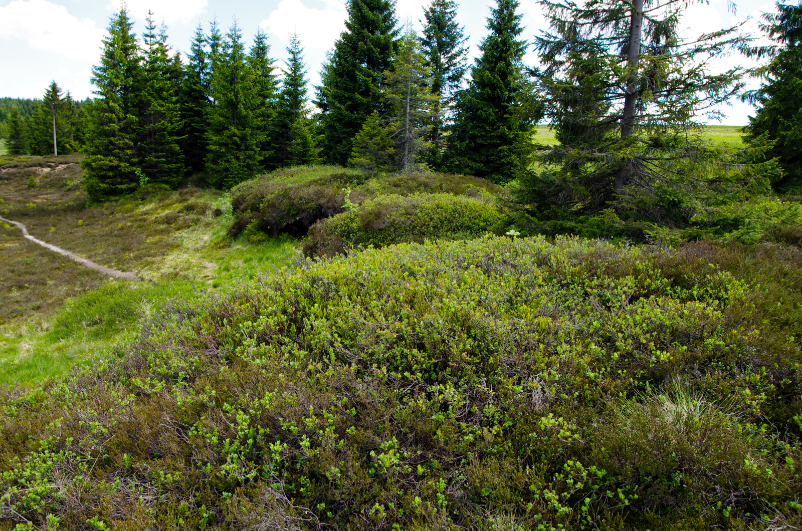 Přírodní památka - Přebuzské vřesoviště, Krušné hory, okres Sokolov